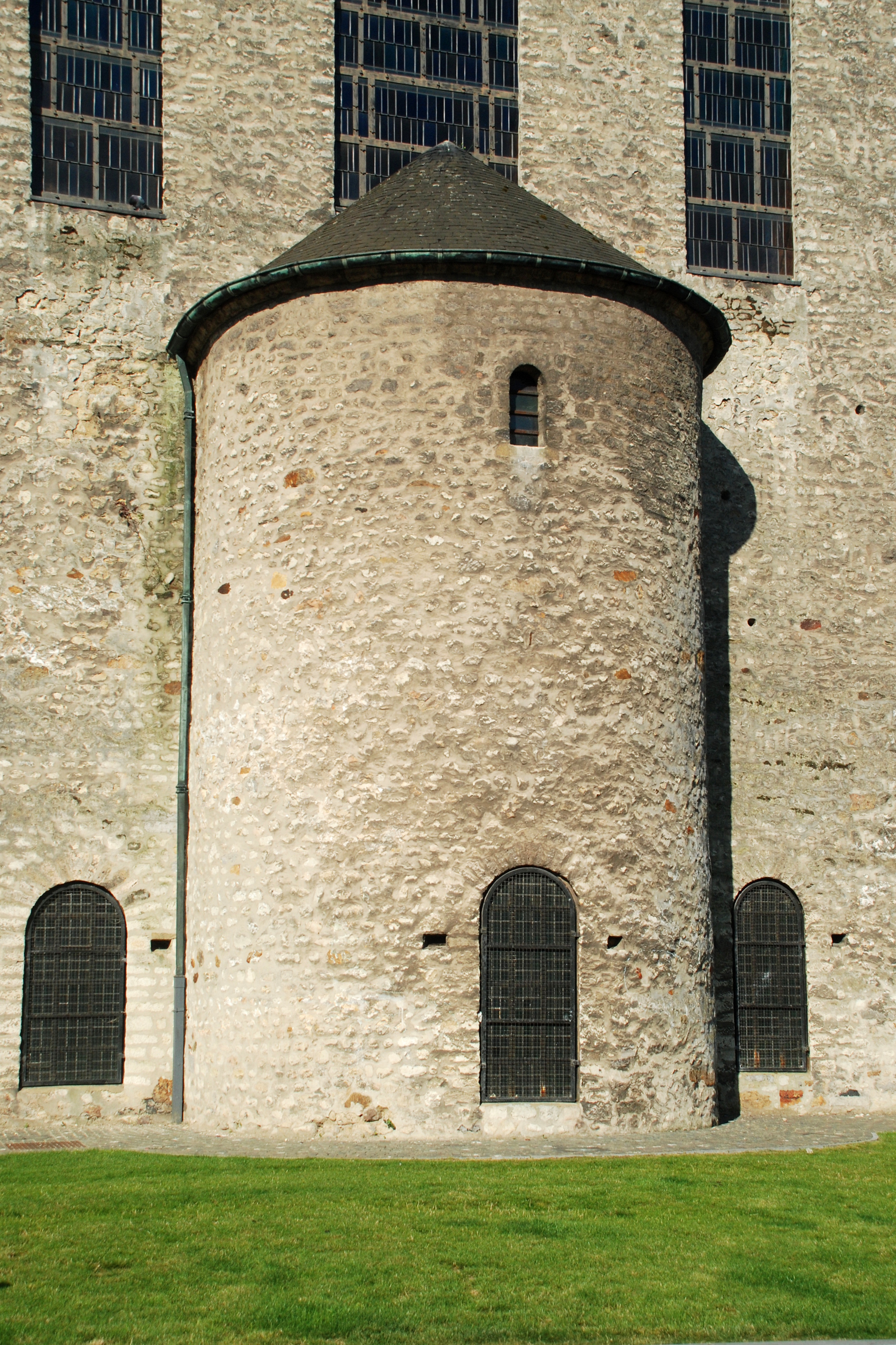 Belgique - Brabant wallon - Nivelles - Collégiale Sainte-Gertrude